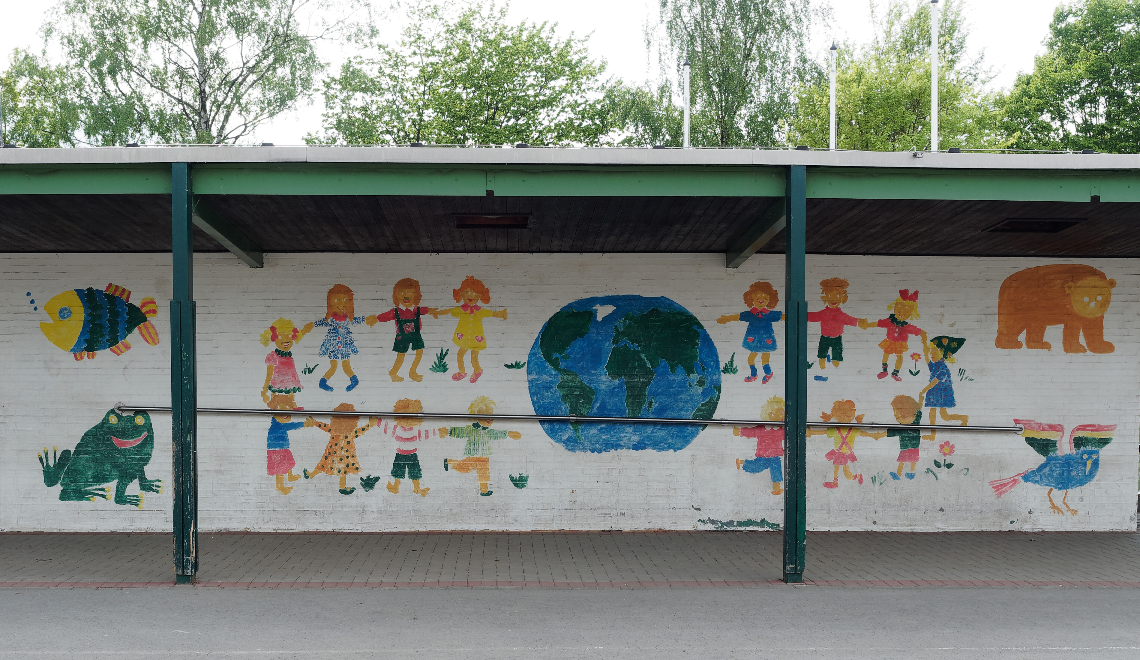 Kunst in der Melanchthonschule in Wickede (Ruhr)